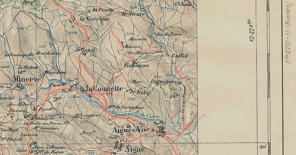 Description: Adaptation couleur de la Carte d'État-Major, 1897. Ici: Secteur de St Pons, Hérault, France. (Carte originale scannée) Source: Hugo SoriaLicence: GFDL Hugo Soria